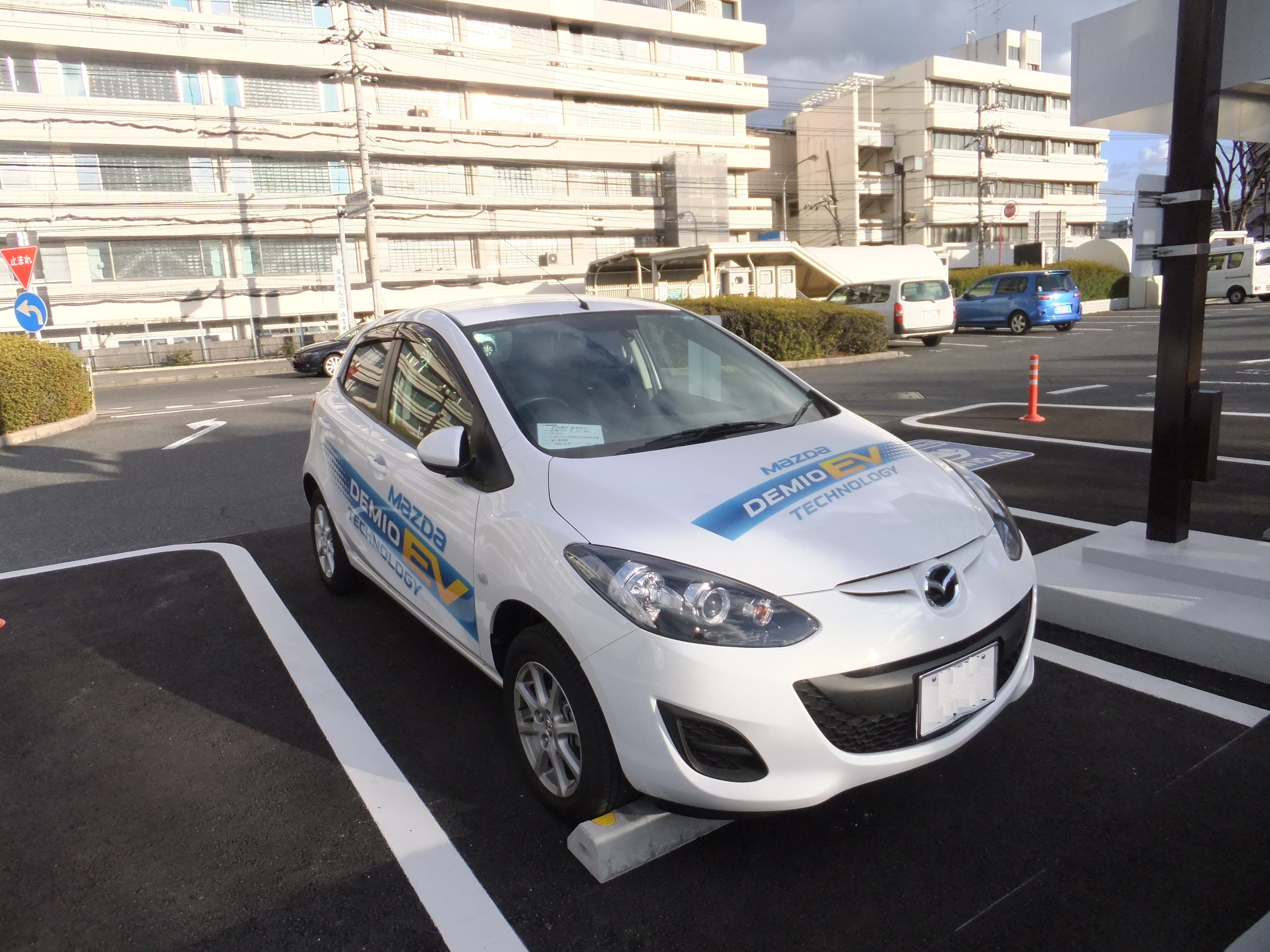 デミオEV